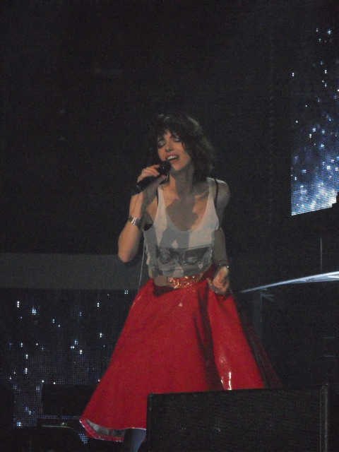 Giorgia si esibisce durante l'anteprima del suo Dietro Le Apparenze Tour